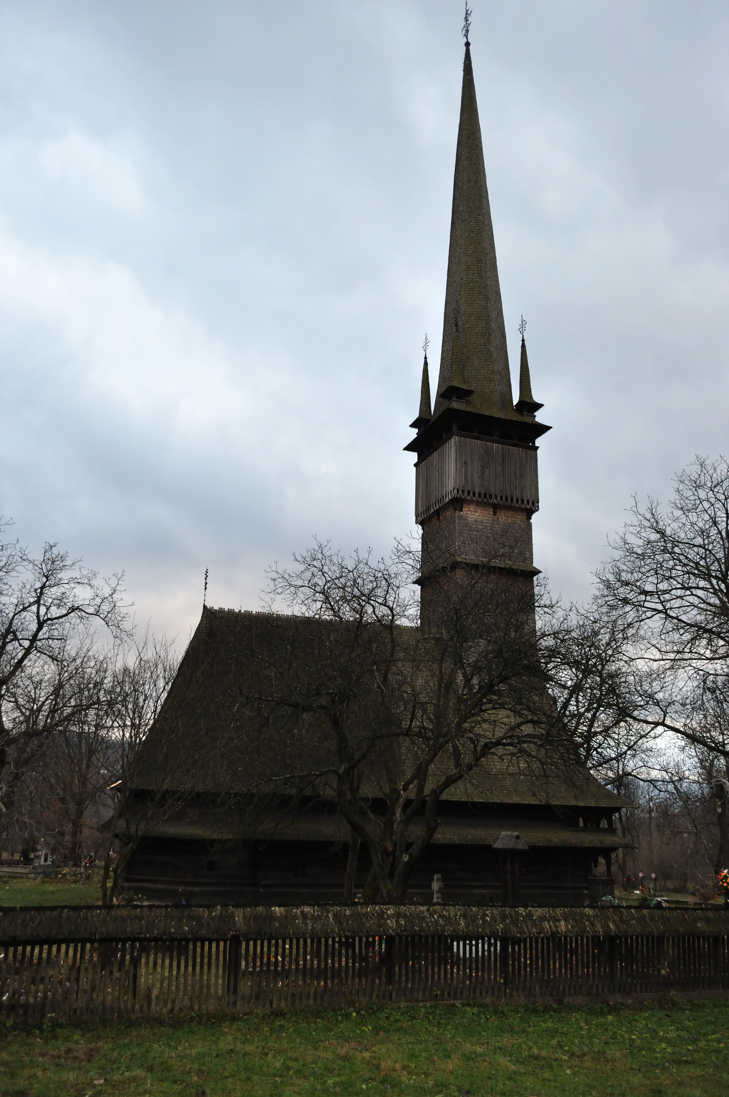 Biserica de lemn „Sfinții Arhangheli” din Șurdești, județul Maramureș